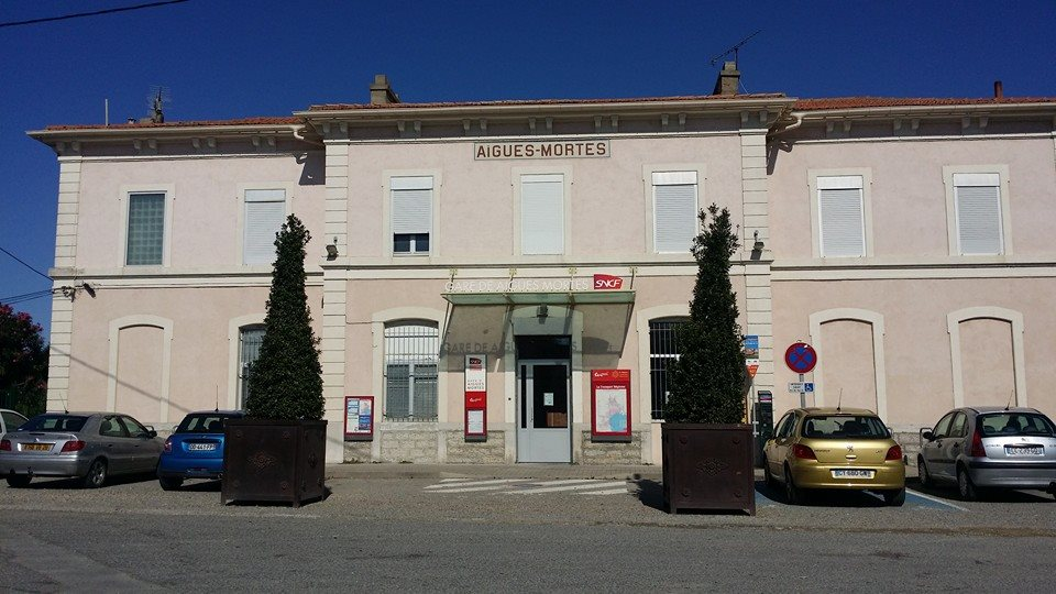 Gare d'Aigues-Mortes